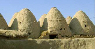 Harran